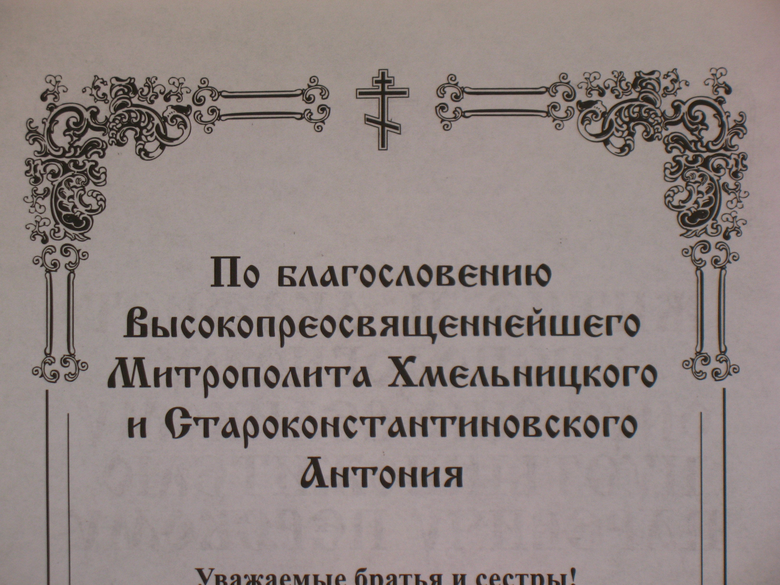 Благословение Митрополита Хмельницкого и Староконстантиновского Антония (УПЦ МП). Текст стандартный.